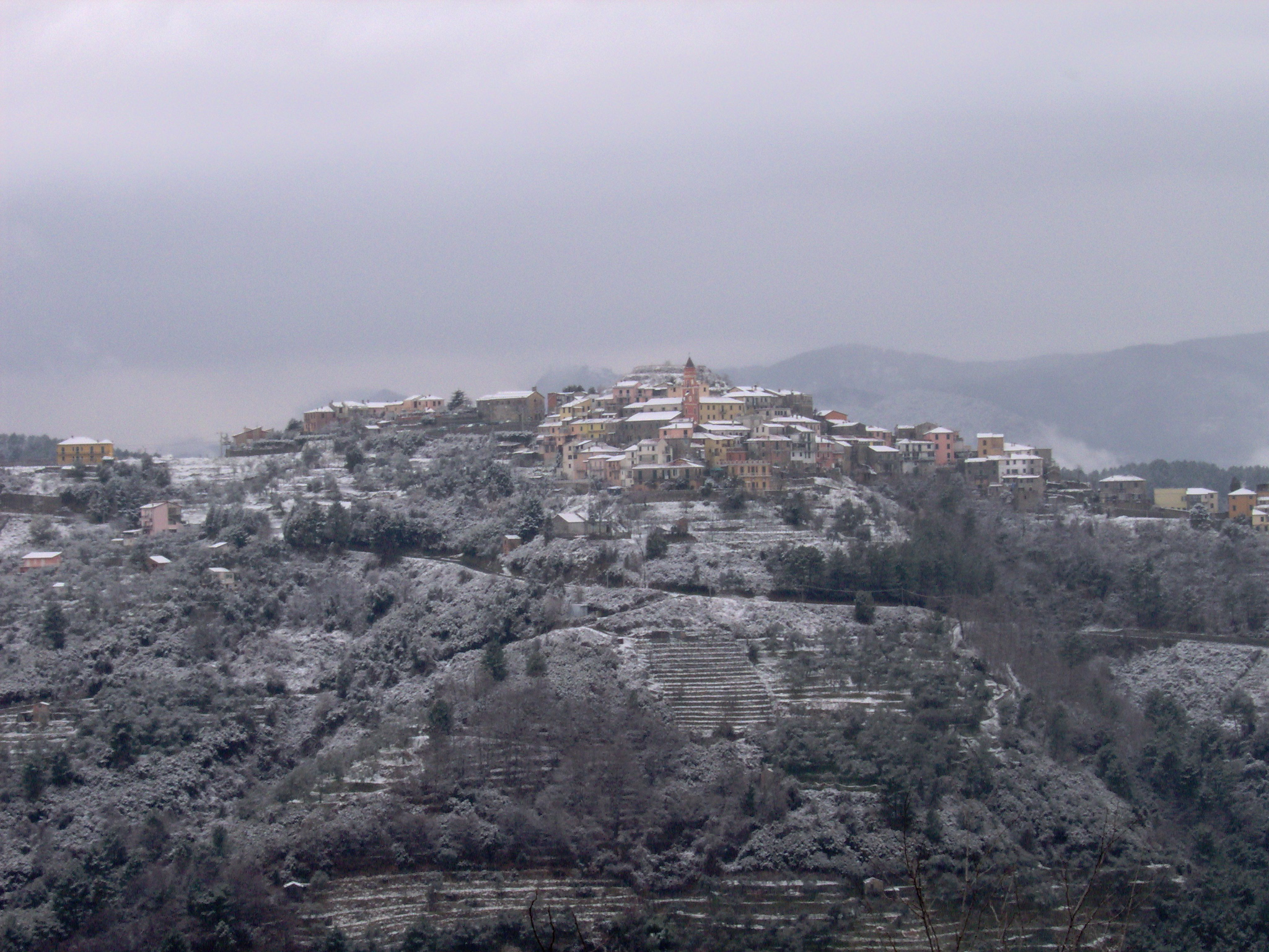 Tivegna - Il Borgo